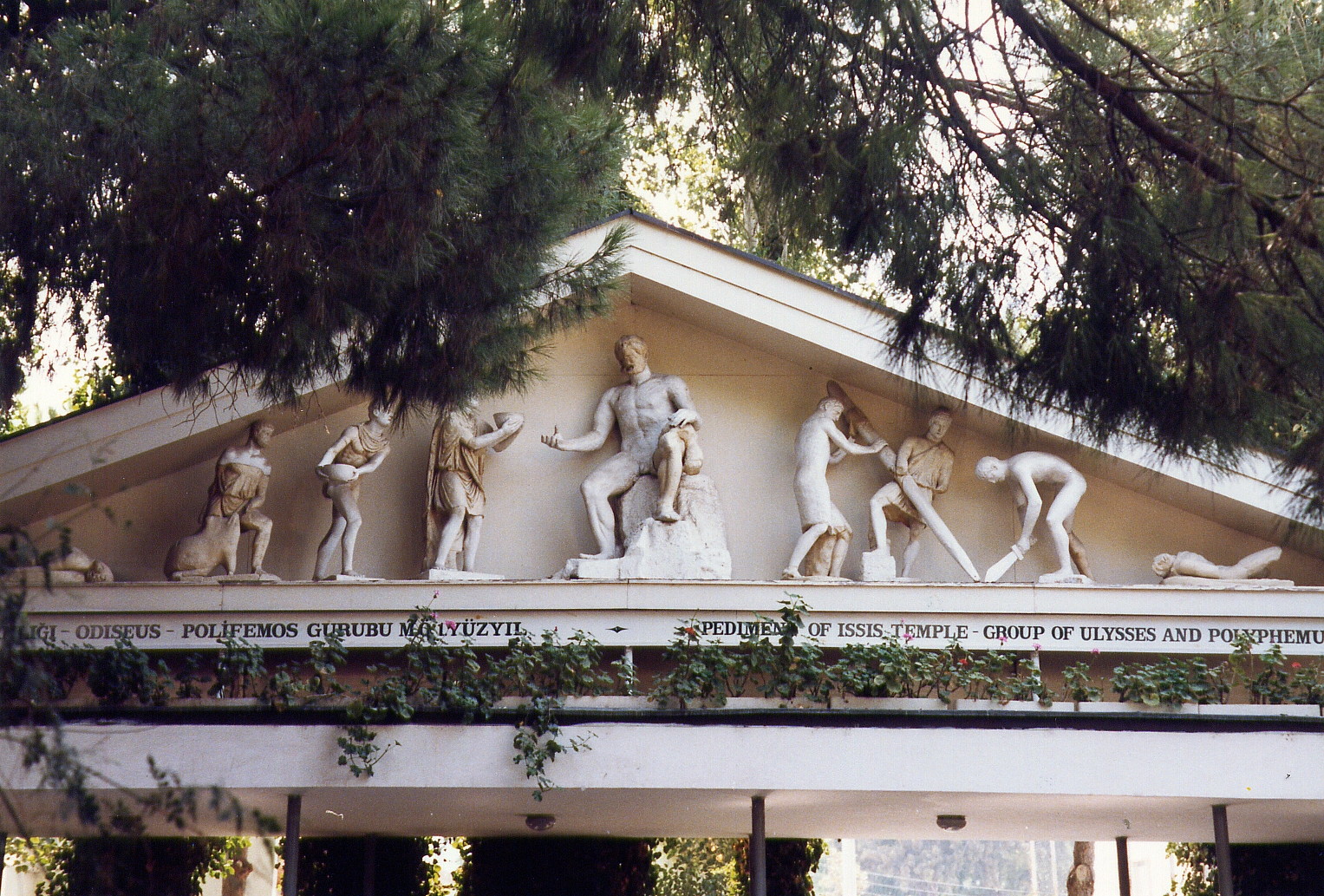 Rekonstruktion der Polyphem-Gruppe, Fries vom Isis-Tempel in Ephesus, Ephesus-Museum Selçuk, Westtürkei